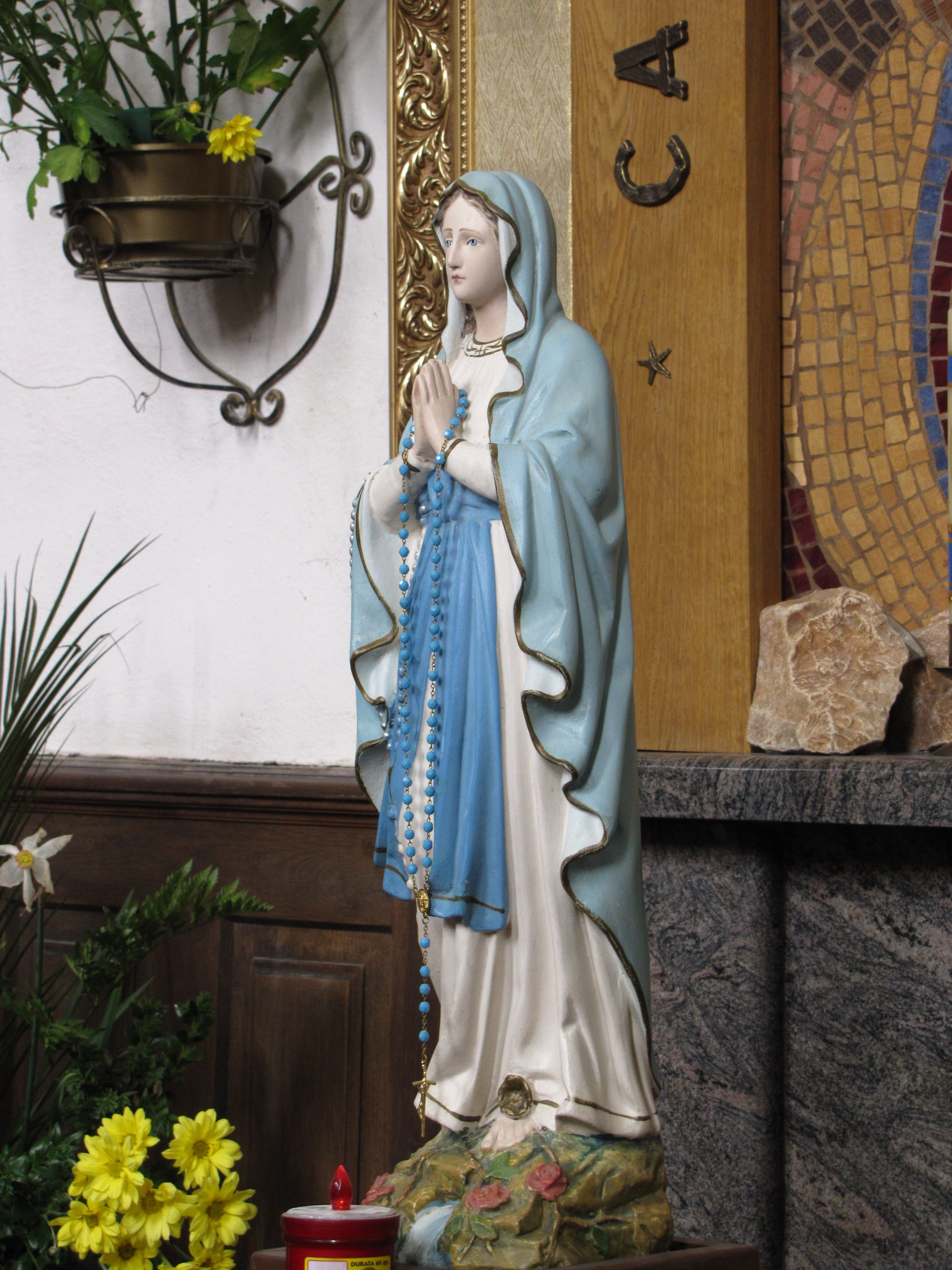 Uznawana za cudowną figurka Matki Bożej w Niżankowicach